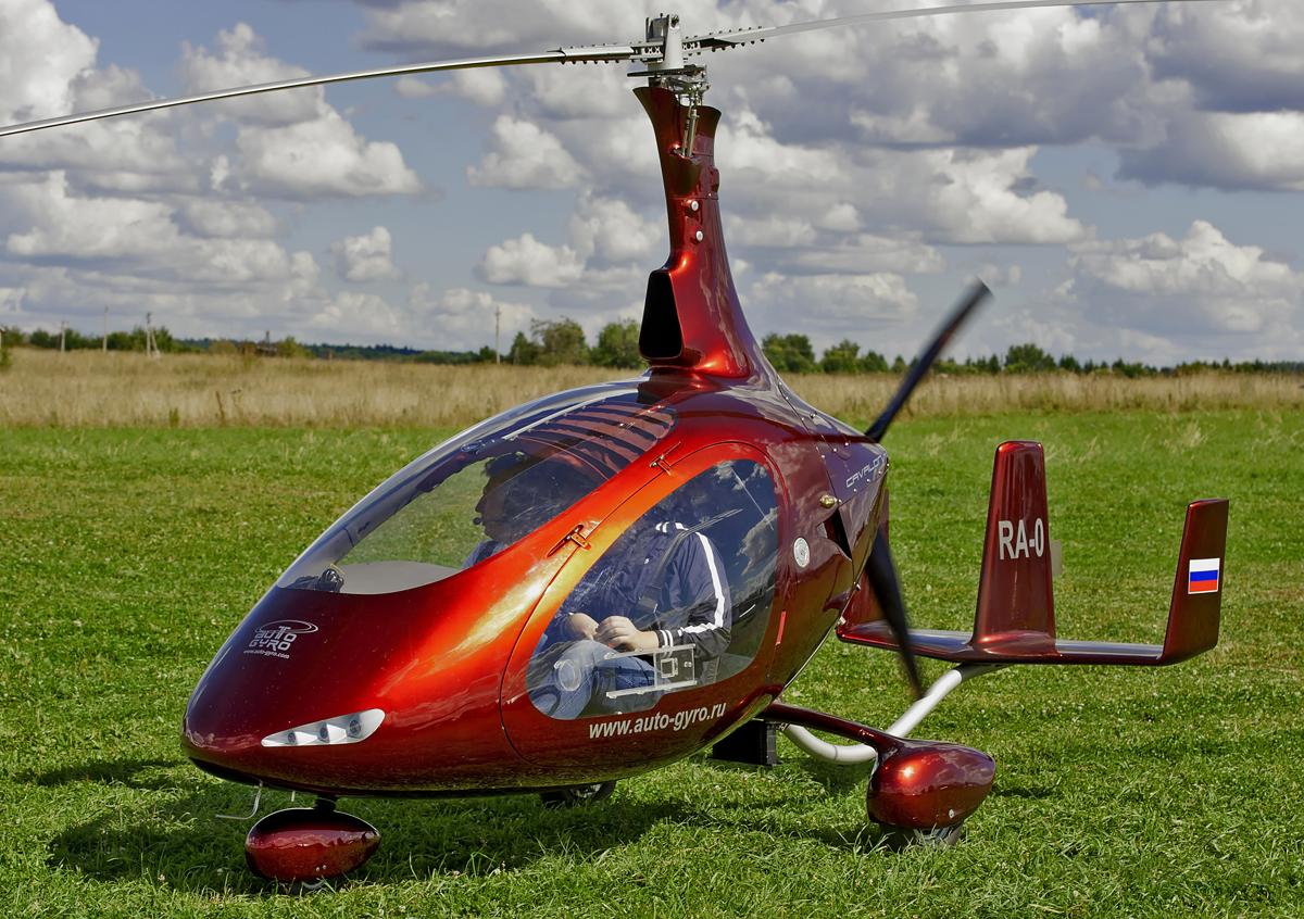 "Cavalon"